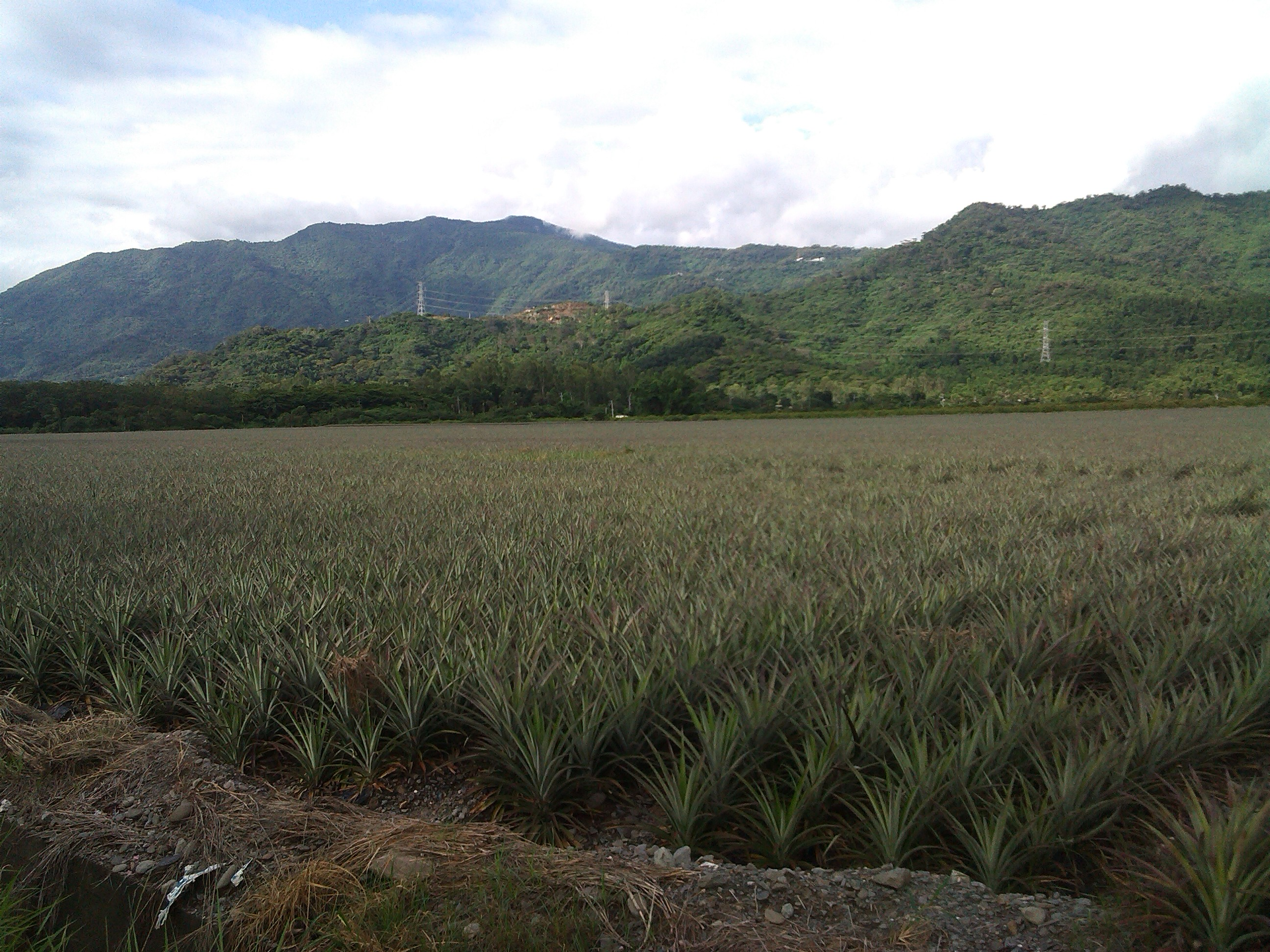 拍攝路段約介於185縣道42~43K處